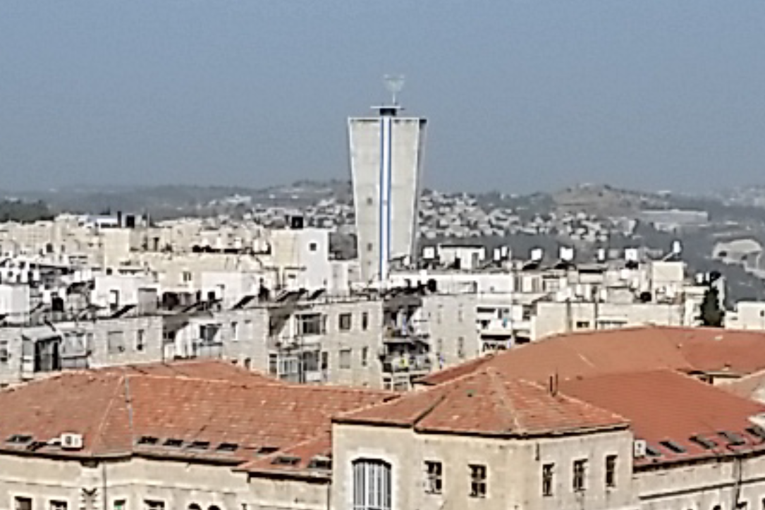 מגדל אשר, לשעבר מגדל המים בקריית משה, ירושלים